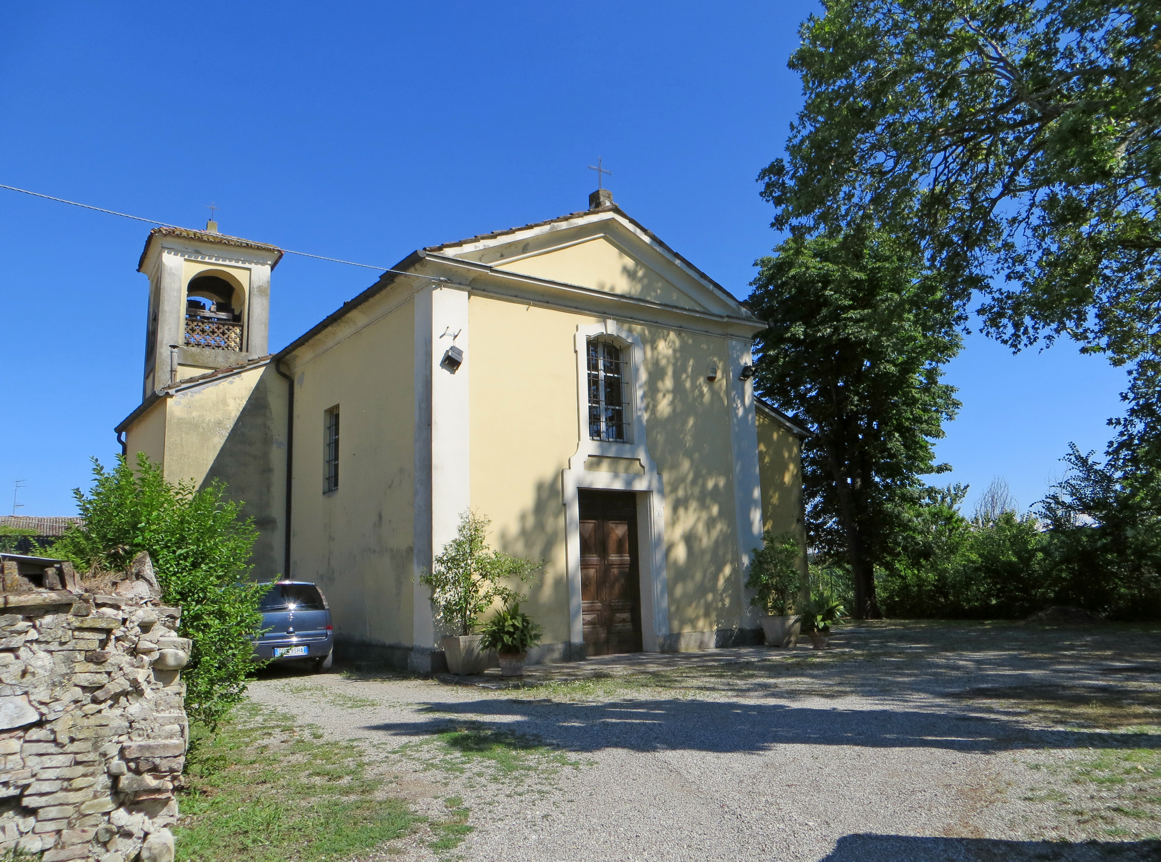 Chiesa di San Terenziano (Fraore, Parma) - facciata e lato nord